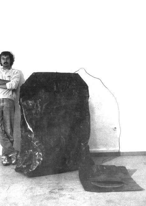 Josef Hirthammer mit Teebeutel 1981